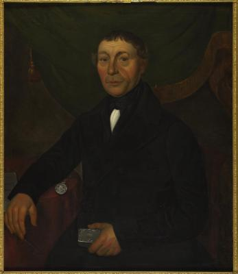 Melchior van Bon